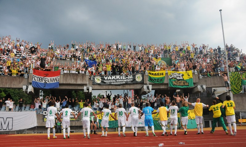 huldiging spelers na de 2-3 gewonnen wedstrijd tegen Tauras